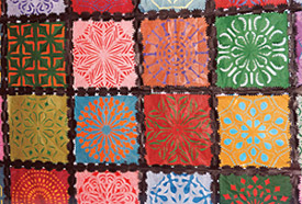 An example of Herminia Albarrán Romero’s masterful papel picado (Mexican paper cutting).